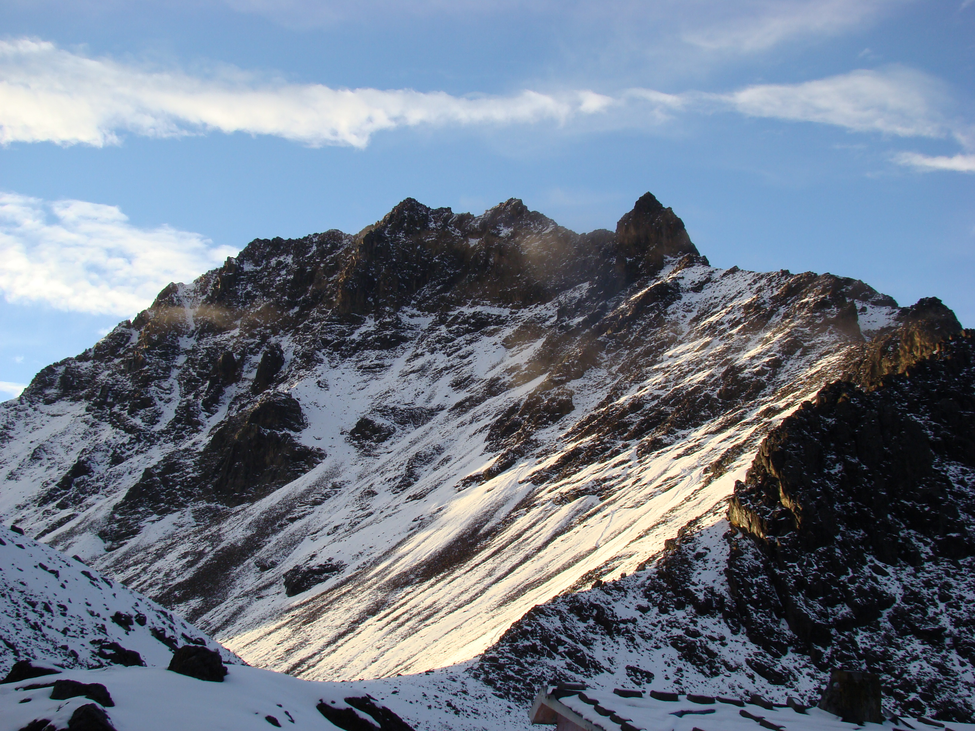 Der verschneite Nordgipfel der Illinizas im Abendlicht